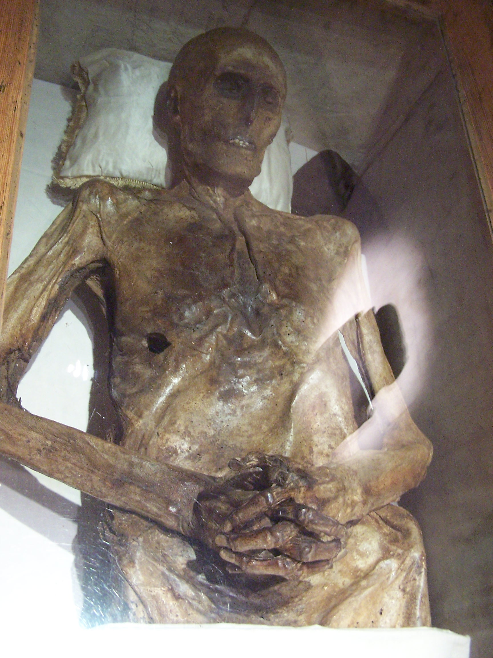 The mummy from Kalhbutz - Die Mumie "Ritter von Kalebuz" , Mai 2005